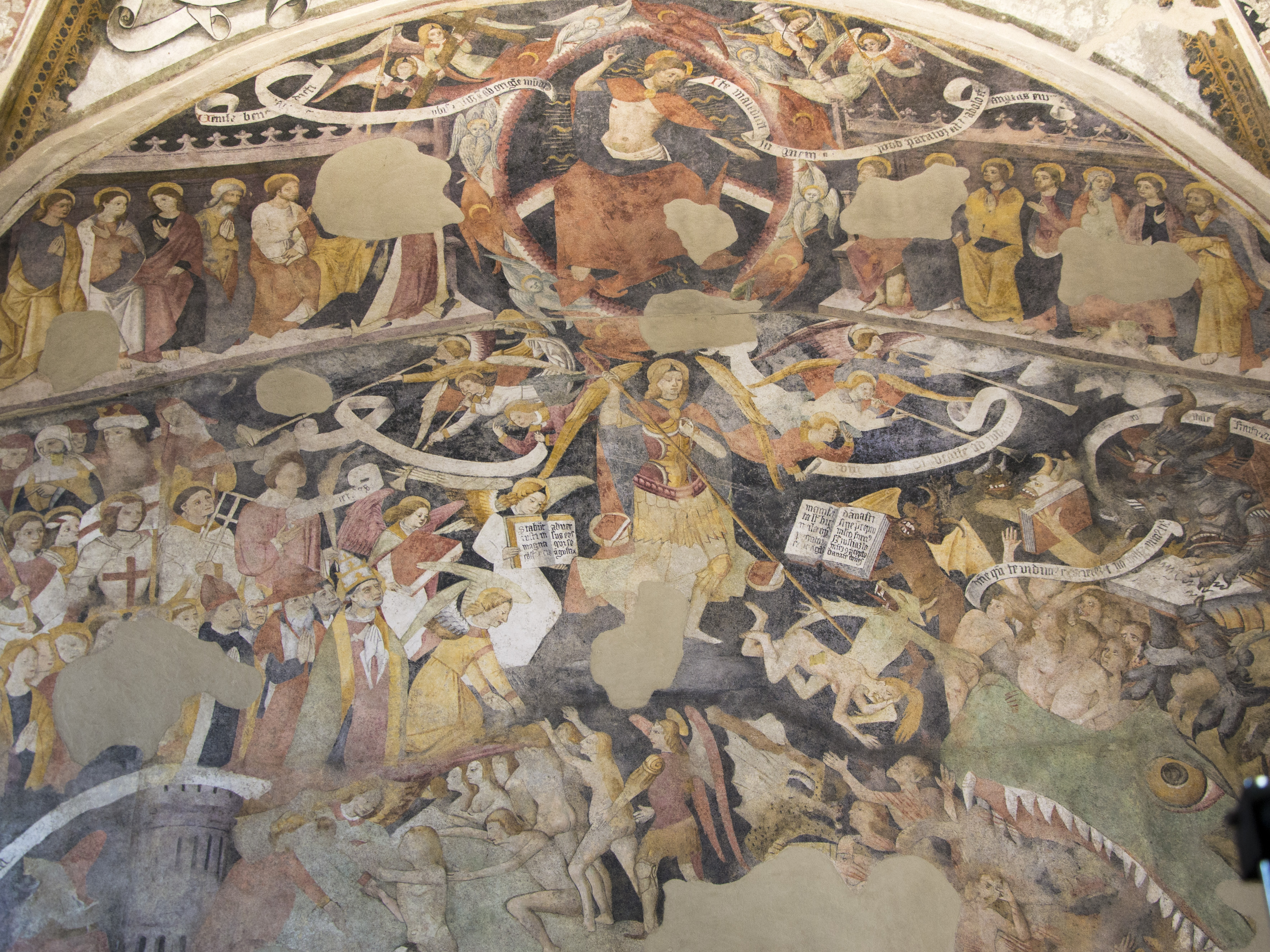 Giovanni Canavesio, Chiesa di San Bernardo (Pigna), 1482, scene della Passione e del Giudizio Universale, Dottori della chiesa